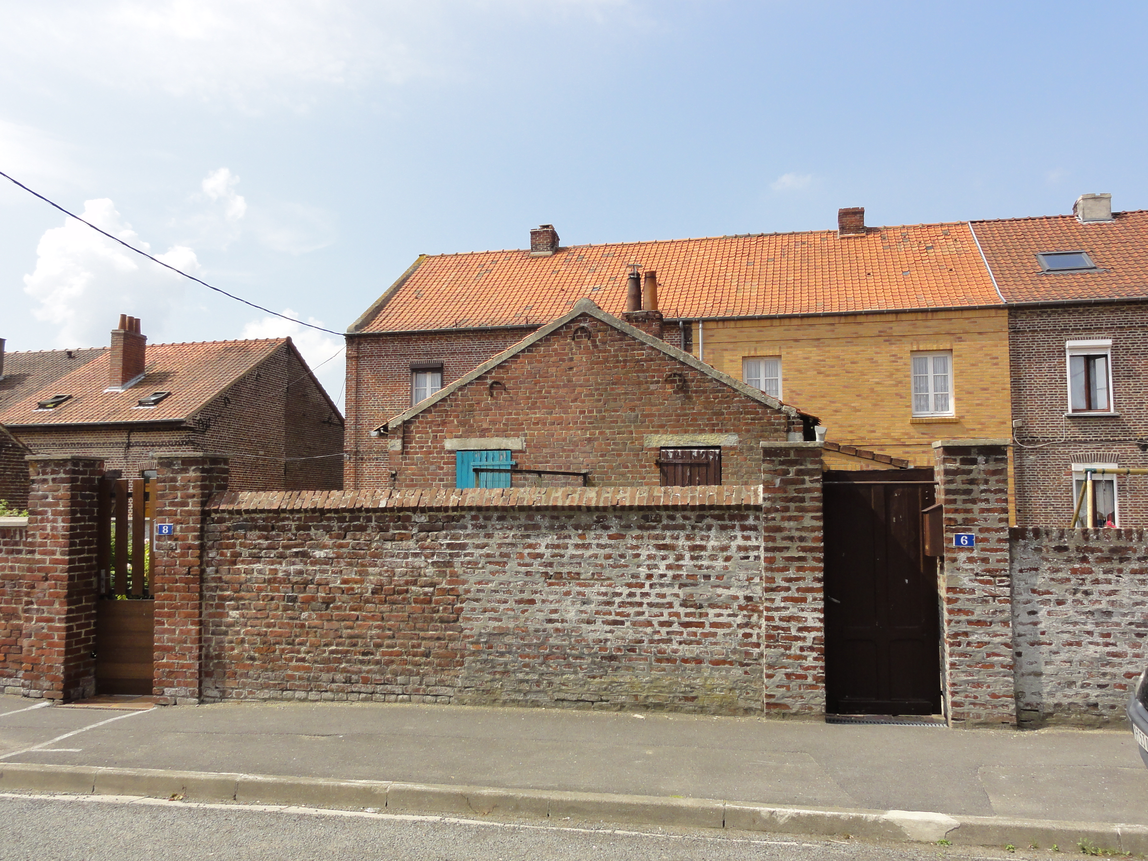 Cité de Fléchinelle de la fosse n° 1 - 1 bis de la Compagnie des mines de Ligny-lès-Aire dans le bassin minier du Nord-Pas-de-Calais, Enquin-les-Mines, Pas-de-Calais, Nord-Pas-de-Calais, France.